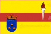 Bandeira do município de Ouro Fino, MG, Brasil.